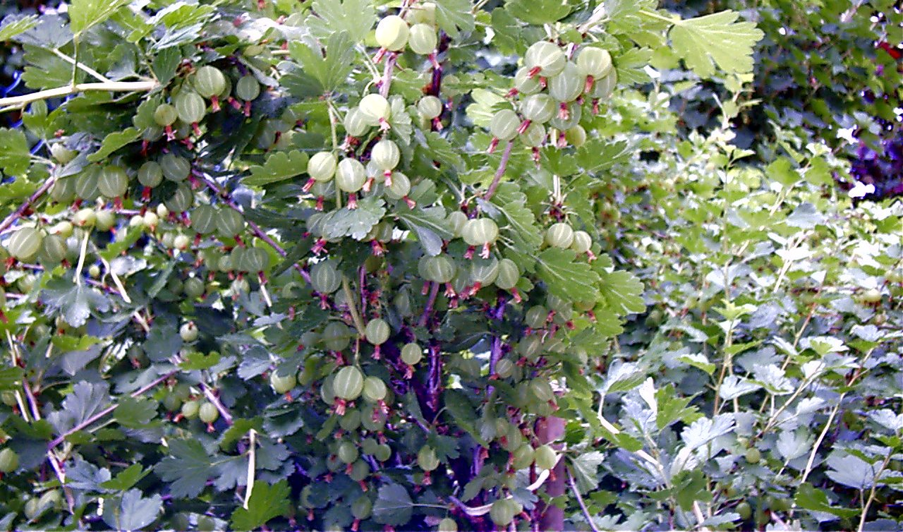 Ribes uva-crispa (gooseberry)